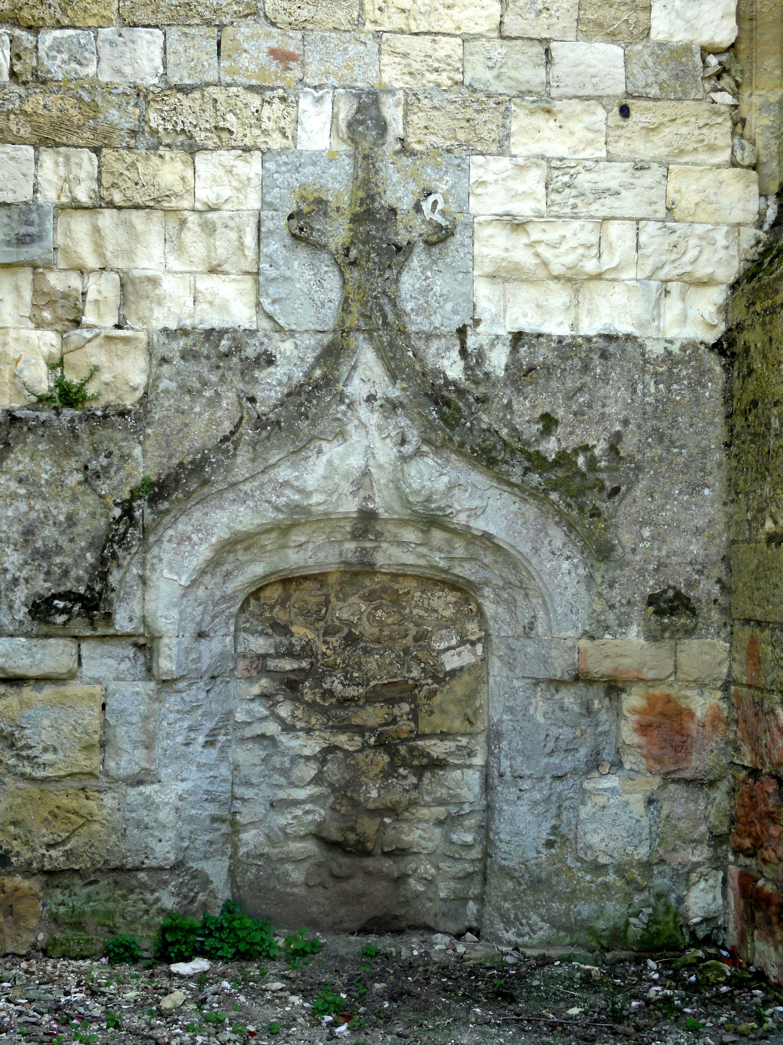 Façade occidentale, porte au décor flamboyant bouchée, à droite.